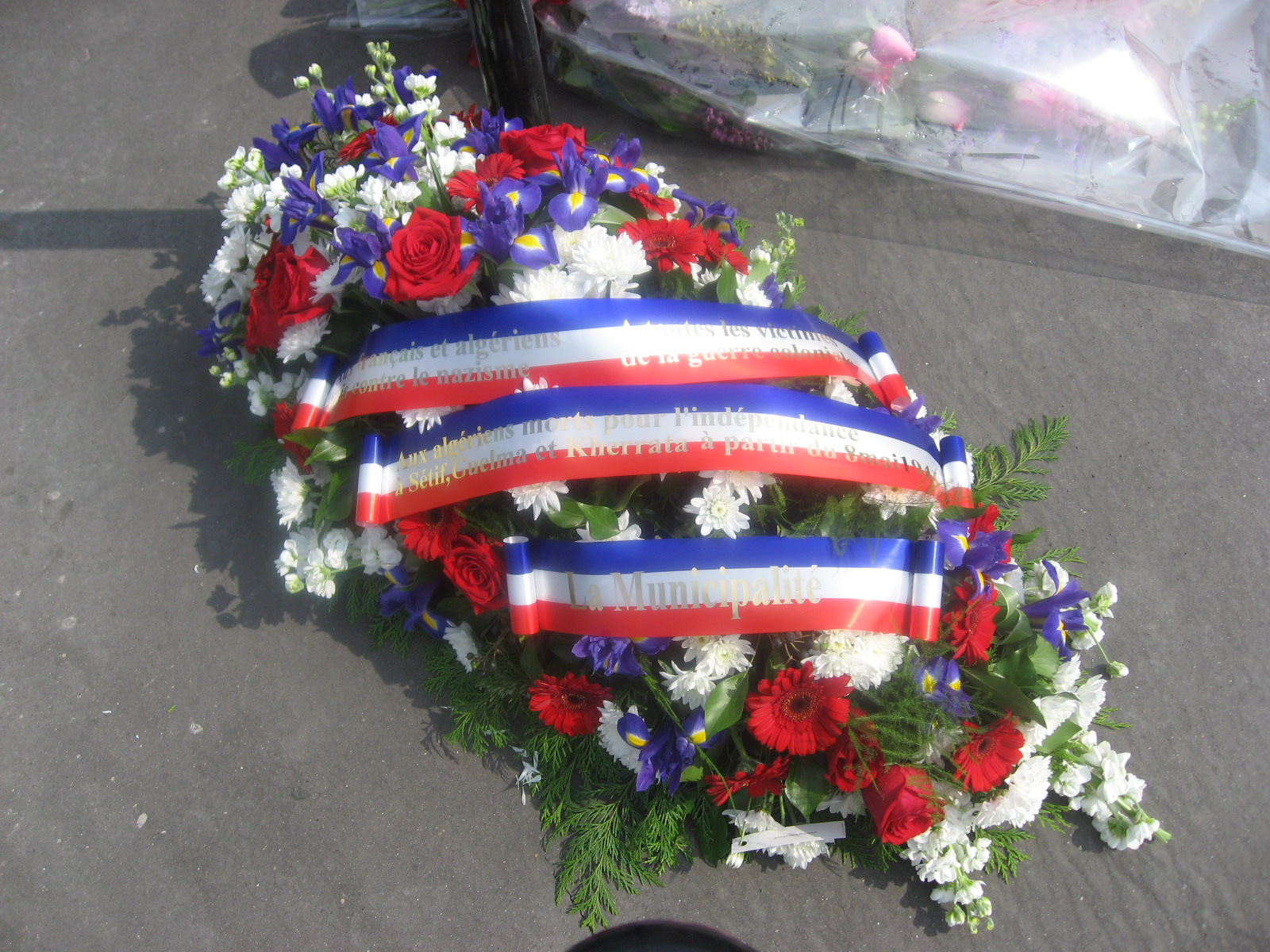 La gerbe déposée par la Ville d'Aubervilliers à la cérémonie du souvenir des massacres de Sétif le 9 mai 2010 à Aubervilliers.